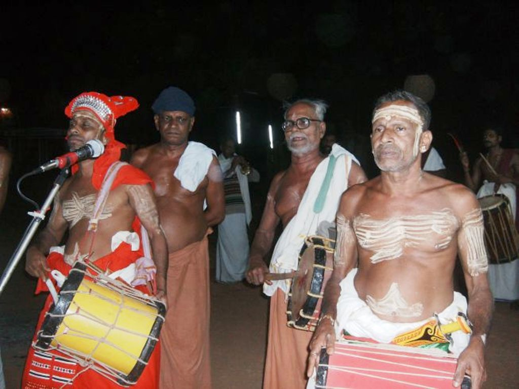 കണ്ണൂര്‍ ജില്ലയിലെ കണ്ണപുരം പഞ്ചായത്തിലെ കീഴറ കൂലോം ഭഗവതി ക്ഷേത്രത്തില്‍ കളിയാട്ടത്തോടനുബന്ധിച്ച് തായ് പരദേവതയുടെയും, മണിയന്‍ ക്ഷേത്രപാലന്റെയും തോറ്റങ്ങള്‍. കലാകാരന്‍മാര്‍: സര്‍വ്വശ്രീ.കണ്ണപെരുവണ്ണാന്‍, സുരേശന്‍ പെരുവണ്ണാന്‍